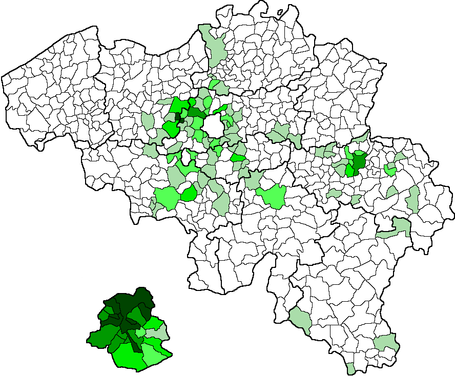 Deze kaart toont de verspreiding van Congolese buitenlanders (burgers van Congo-Kinshasa zonder Belgisch paspoort) in België in 2017. Elke gemeente is ingekleurd naargelang de concentratieindex Congolese buitenlanders in die gemeente. De formule hiervoor is (#Congolese buitenlanders in gemeente/#Inwoners van gemeente)/(#Congolese buitenlanders in België/#Inwoners van België) * 100. Legenda: 450 De gebruikte gegevens zijn afkomstig uit het .xls-bestand "Bevolking naar nationaliteit en geslacht per gemeente" op statbel.be. De gebruikte kaart van de gemeenten van België is File:Belgique-Communes589-Provinces10.gif.